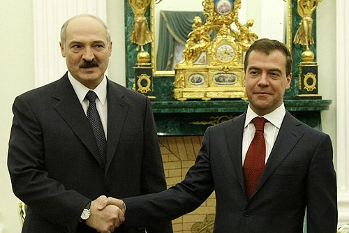 МОСКВА, КРЕМЛЬ. С Президентом Белоруссии Александром Лукашенко.